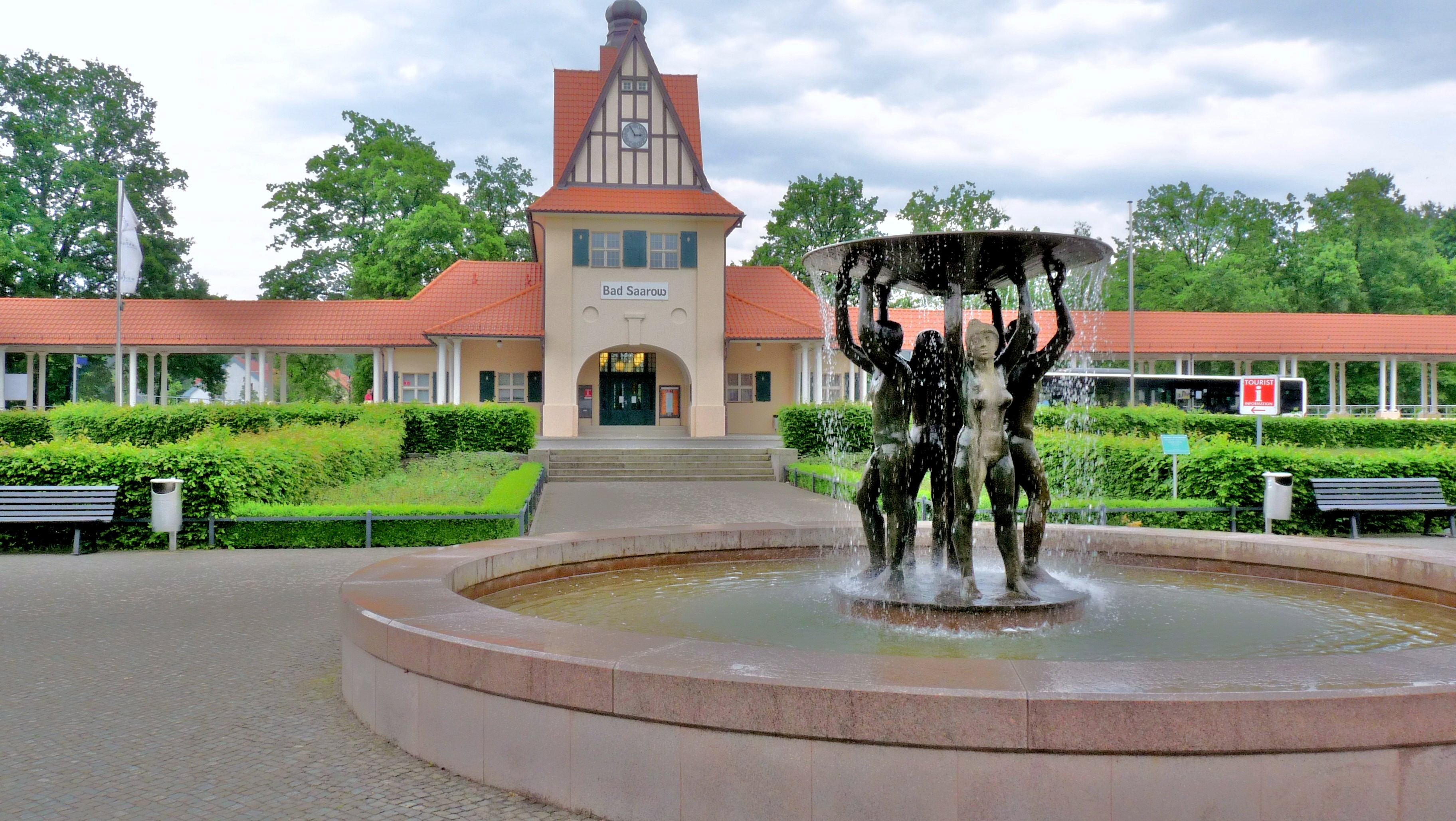 Bahnhof Bad Saarow mit Brunnen,am Scharmützelsee.